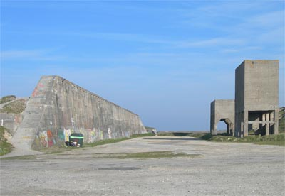 Treguennec vue générale du camp TODT. Du haut du mur à gauche, les wagonnets déversaient les galets dans 5 trémies filtrantes.